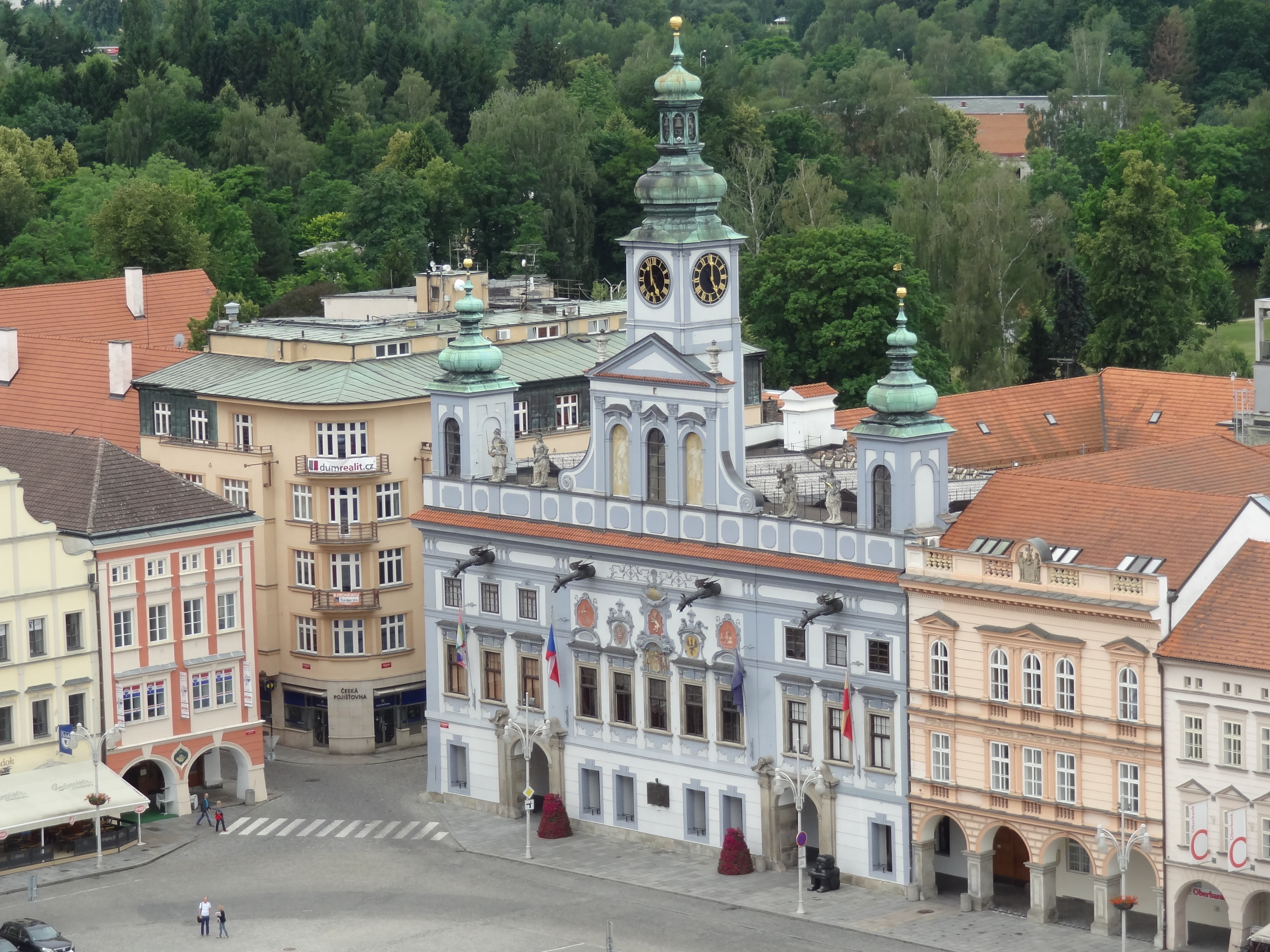 Radnice, nám. Přemysla Otakara II. 1/1, České Budějovice.